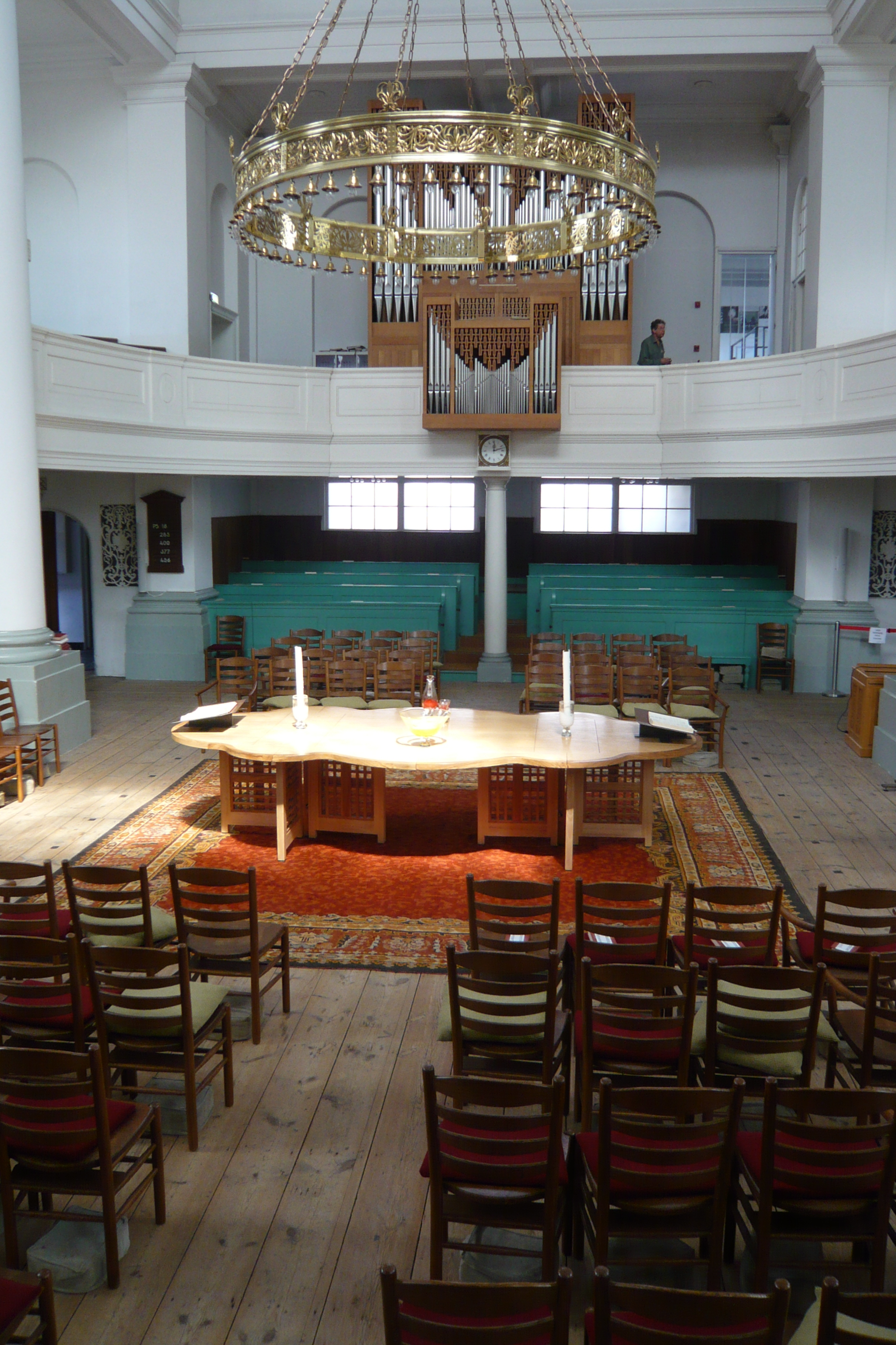 Doopsgezinde kerk, Grote Houtstraat & Peuzelaarsteeg & Frankestraat, Haarlem zicht vanaf preekstoel